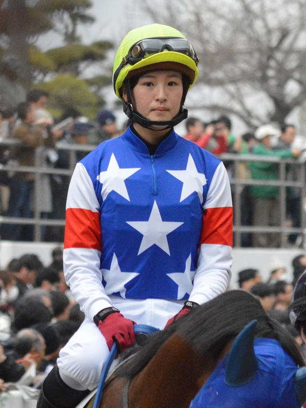 藤田菜七子騎乗馬/中山12R・スワンボート(13頭立て9番人気11着）